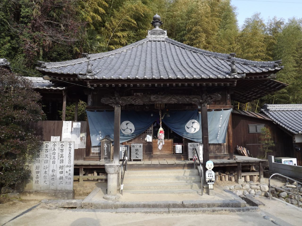 栄福寺の大師堂